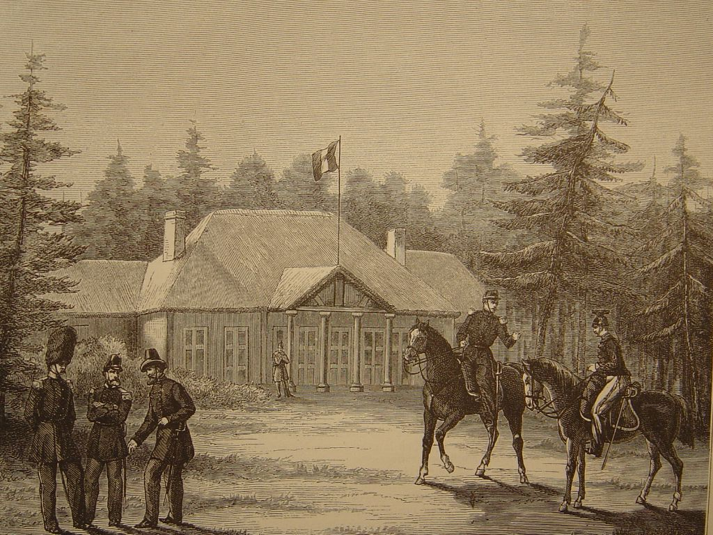 le camp de Beverloo -le pavillon du ministère de la guerre par c. Payen